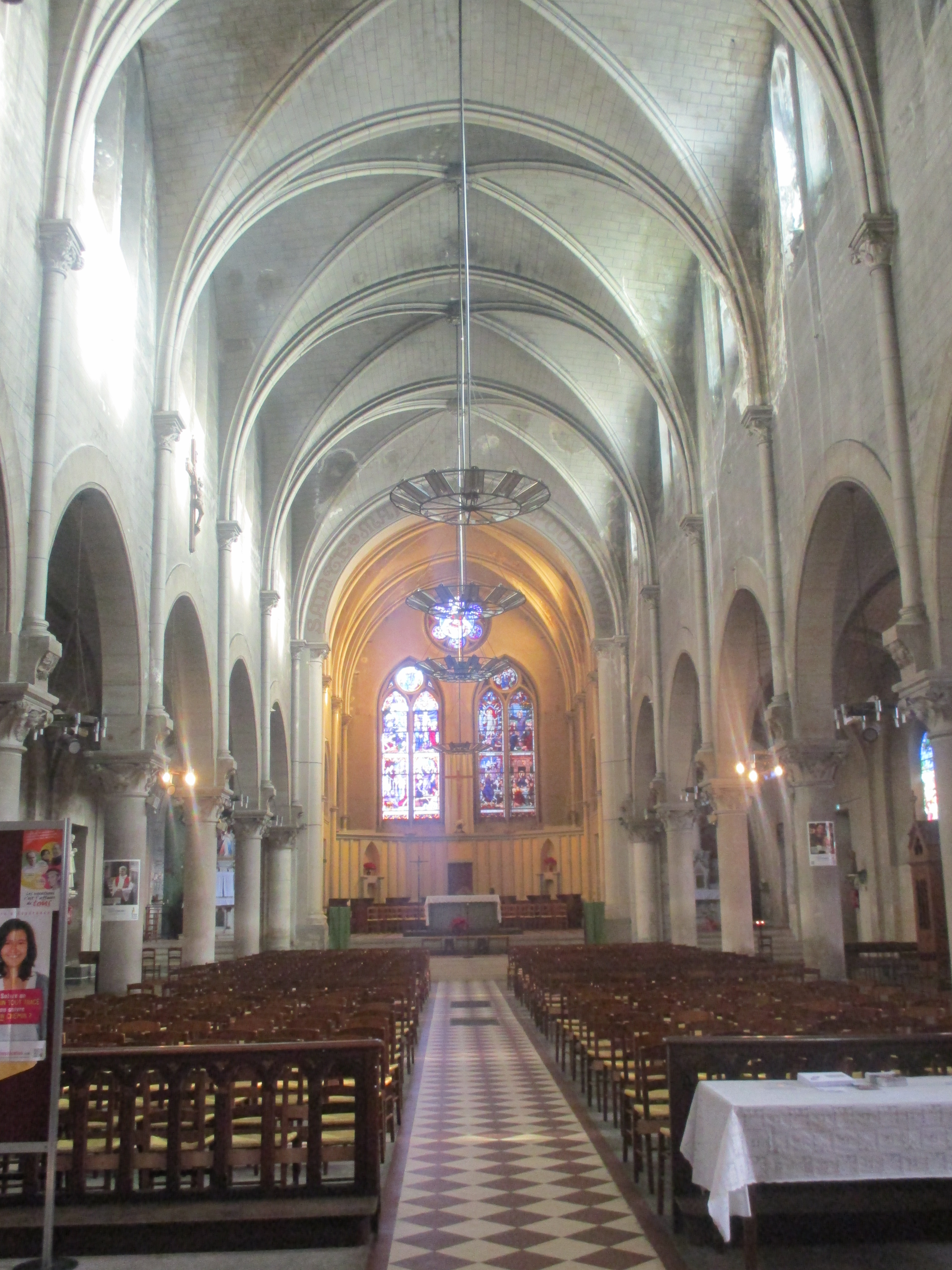 Nef de l'église Sainte-Marthe des Quatre-Chemins de Pantin.